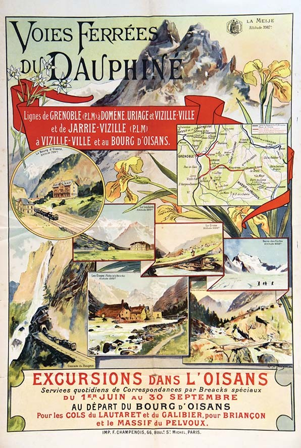 Affiche de Louis Tauzin